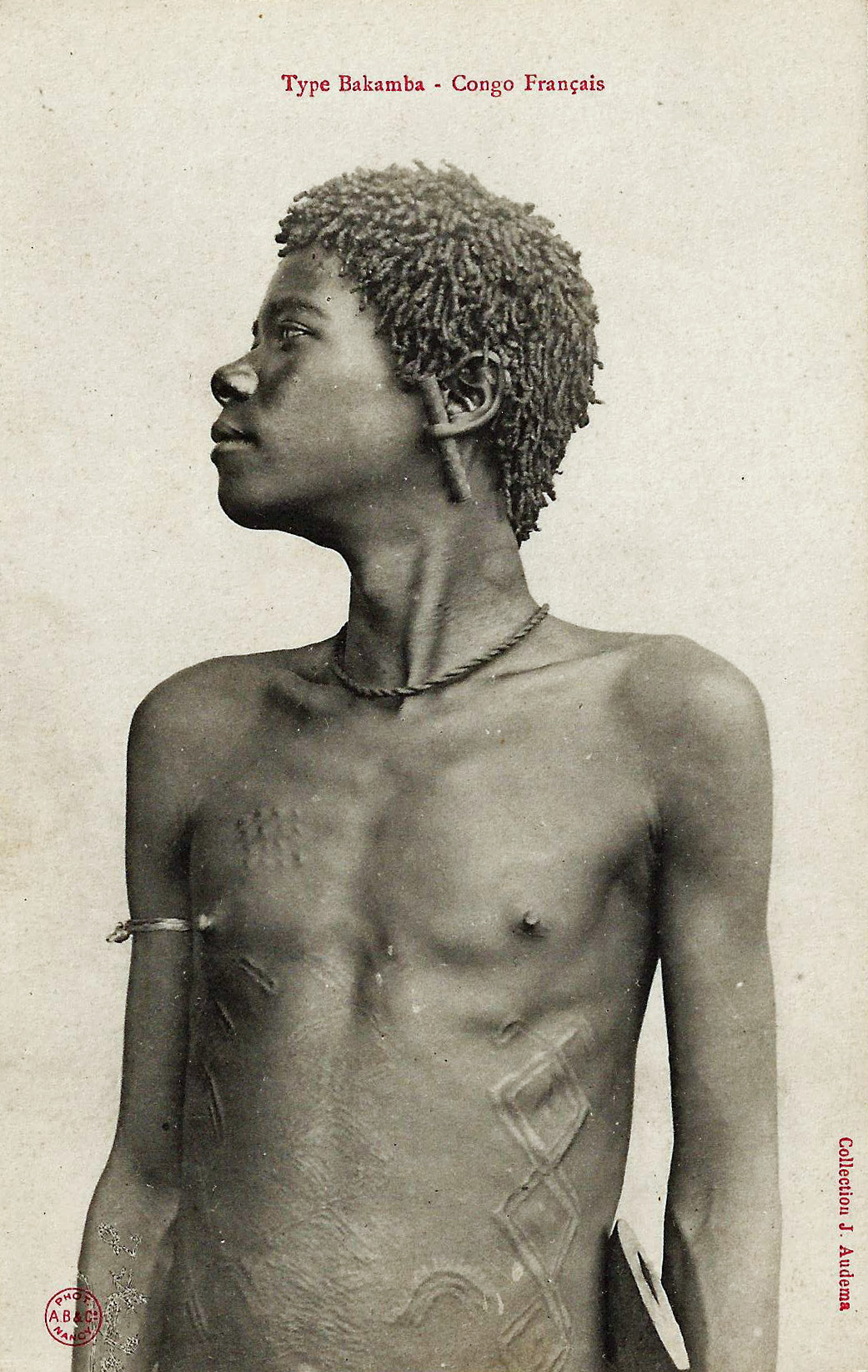 Type Bakamba. Collection J. Audema. Phot. A.B. & Cie, Nancy [Albert Bergeret] Congo Français